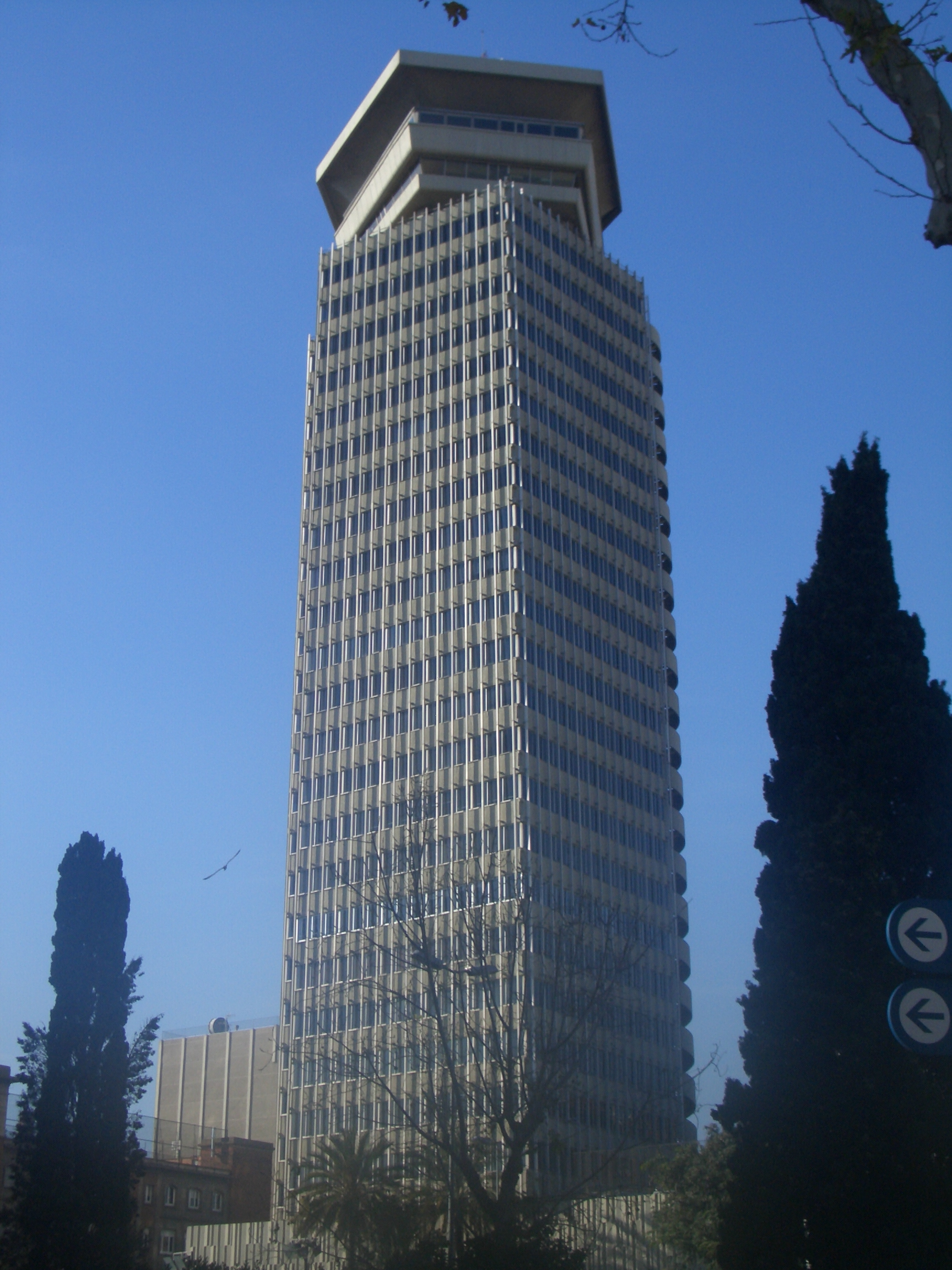 Edificio proximo a las ramblas Barcelona,España.